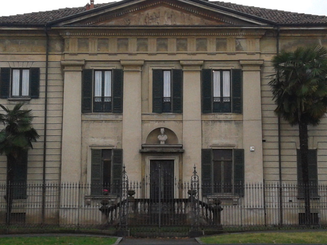 Villa Carminati-Ferrario, facciata